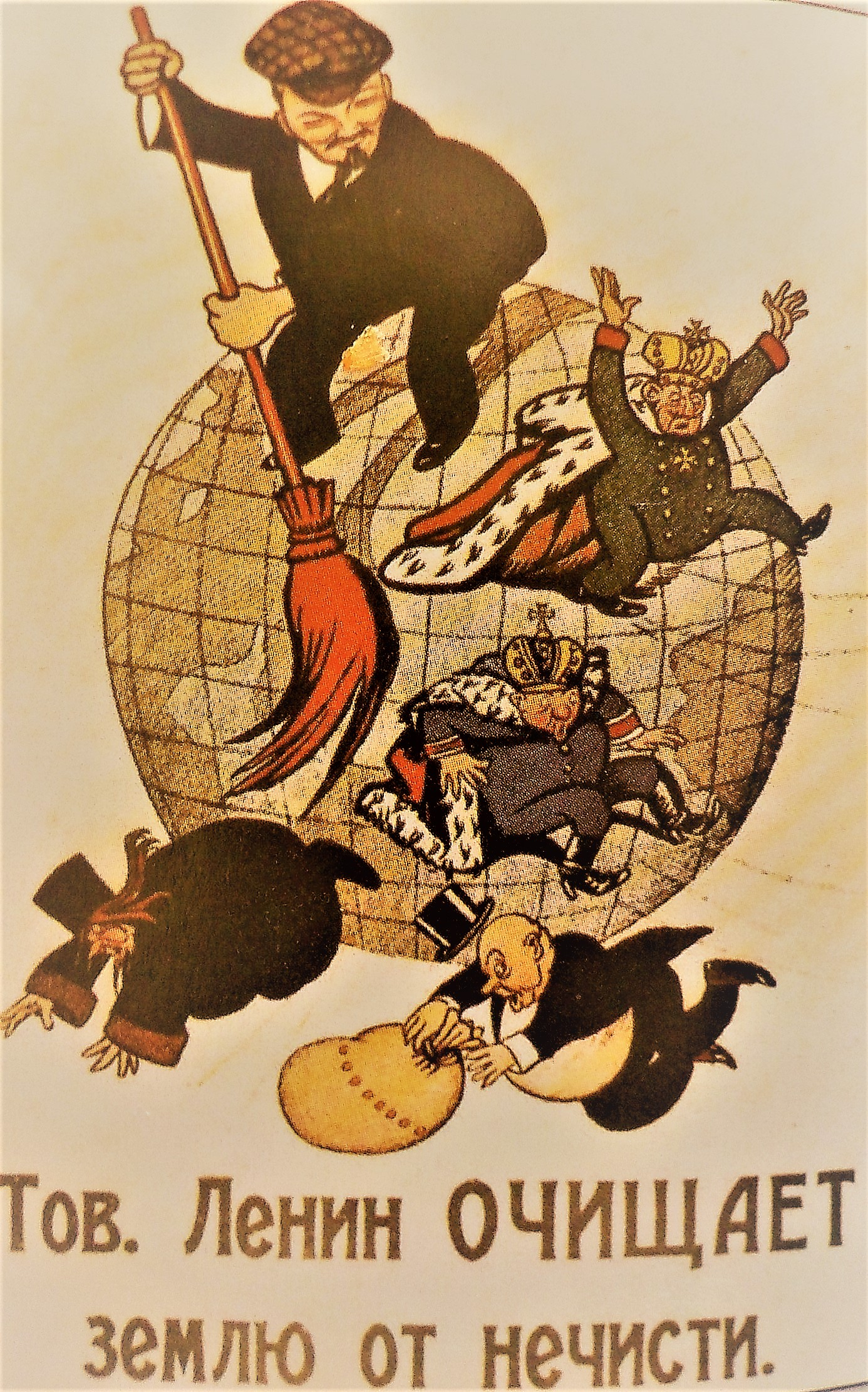 "Товарищ Ленин очищает землю от нечисти." (“Kamrat Lenin städar bort det onda ur världen“.)